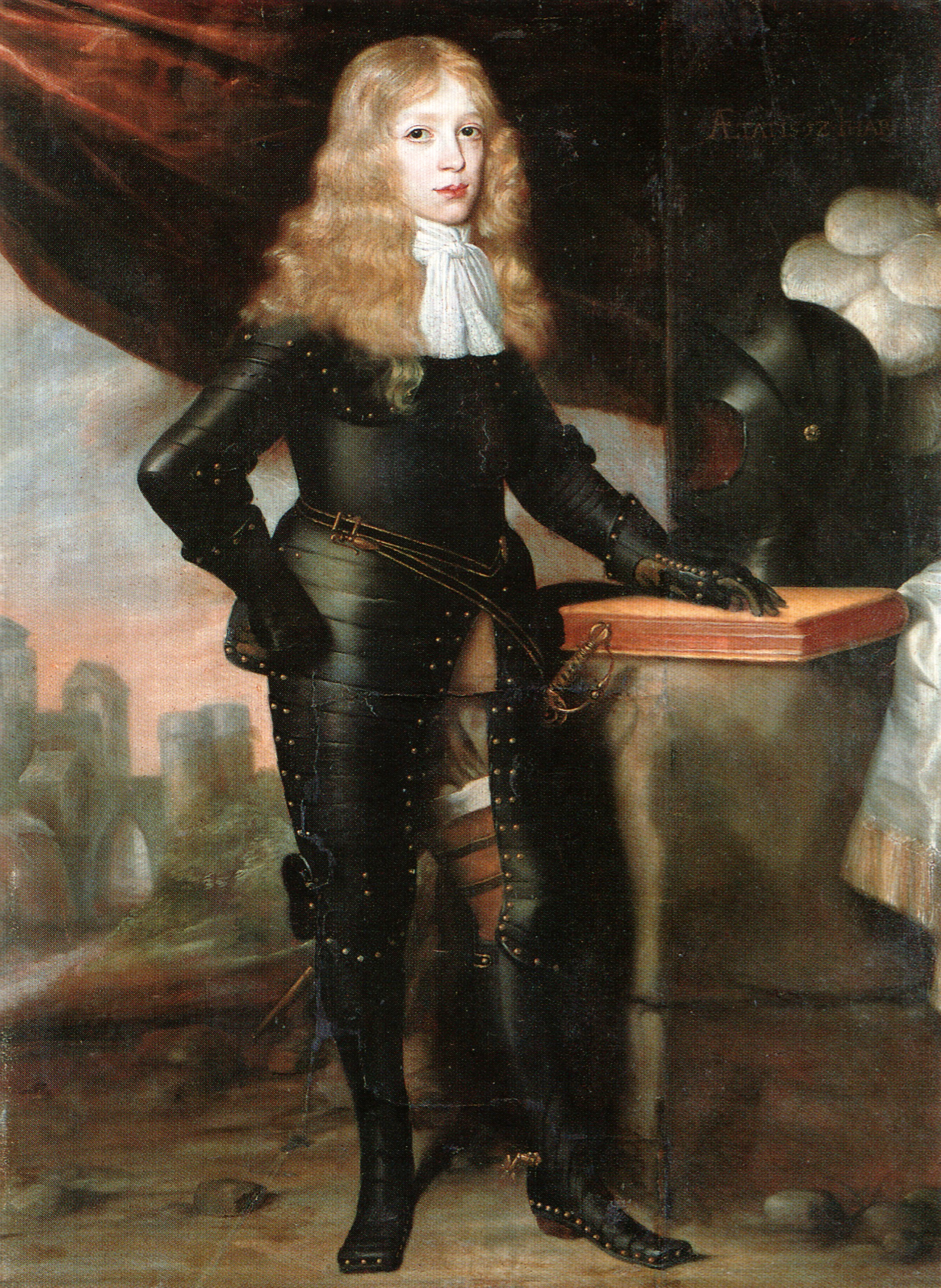 Bildnis von Siegmund Kasimir Graf zu Lynar.